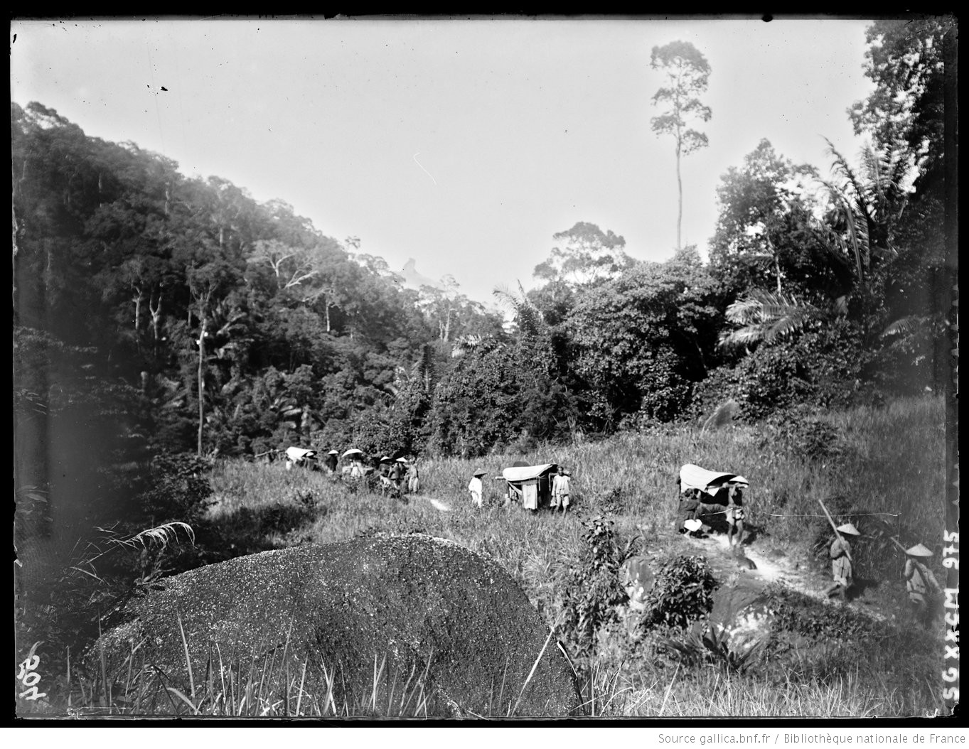 Annam. Sur la route mandarine. Dans le Deo-Ca / [photogr.] A. S[alles]